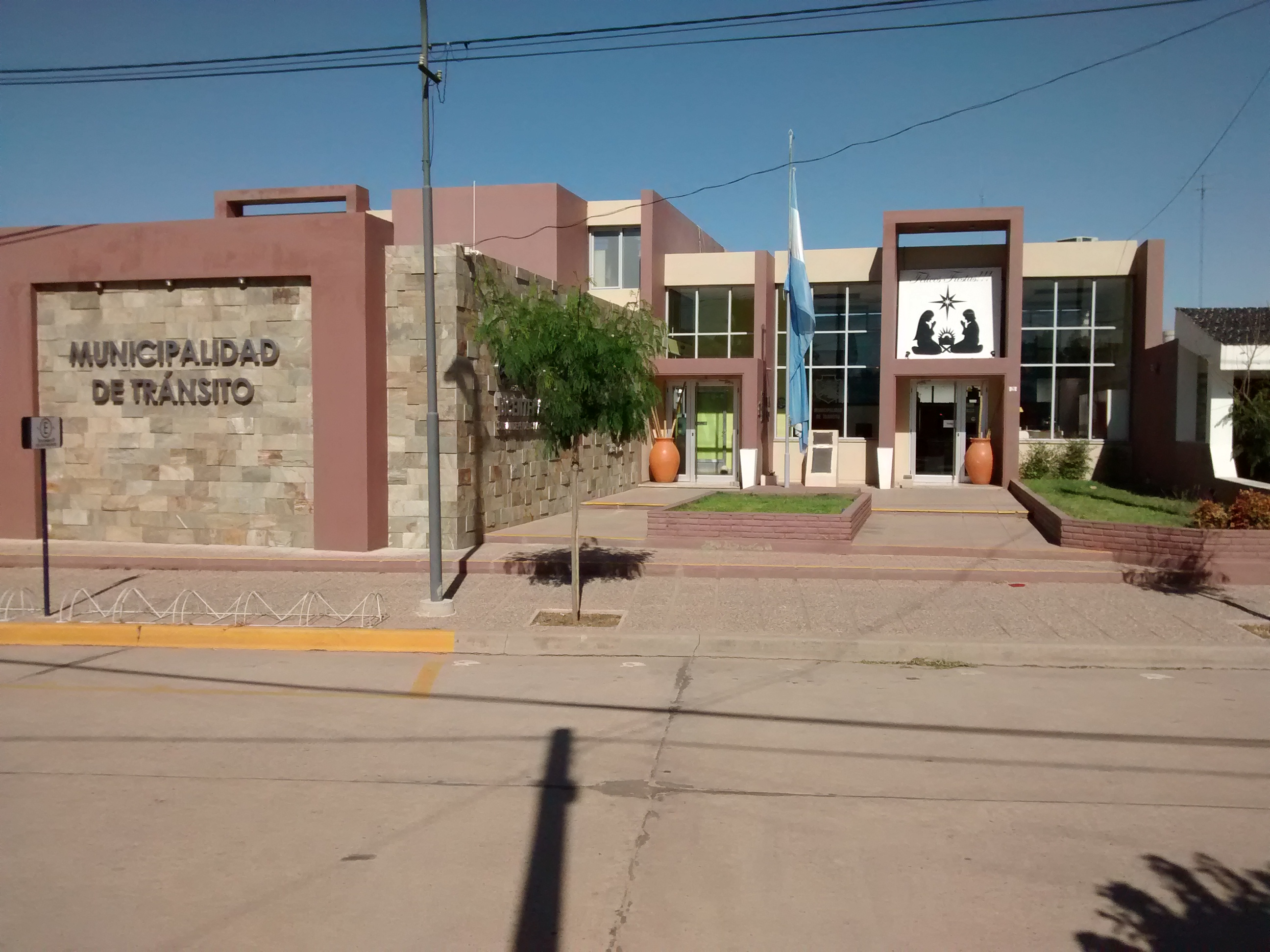 Municipalidad de la Localidad de Tránsito, Córdoba, Argentina.